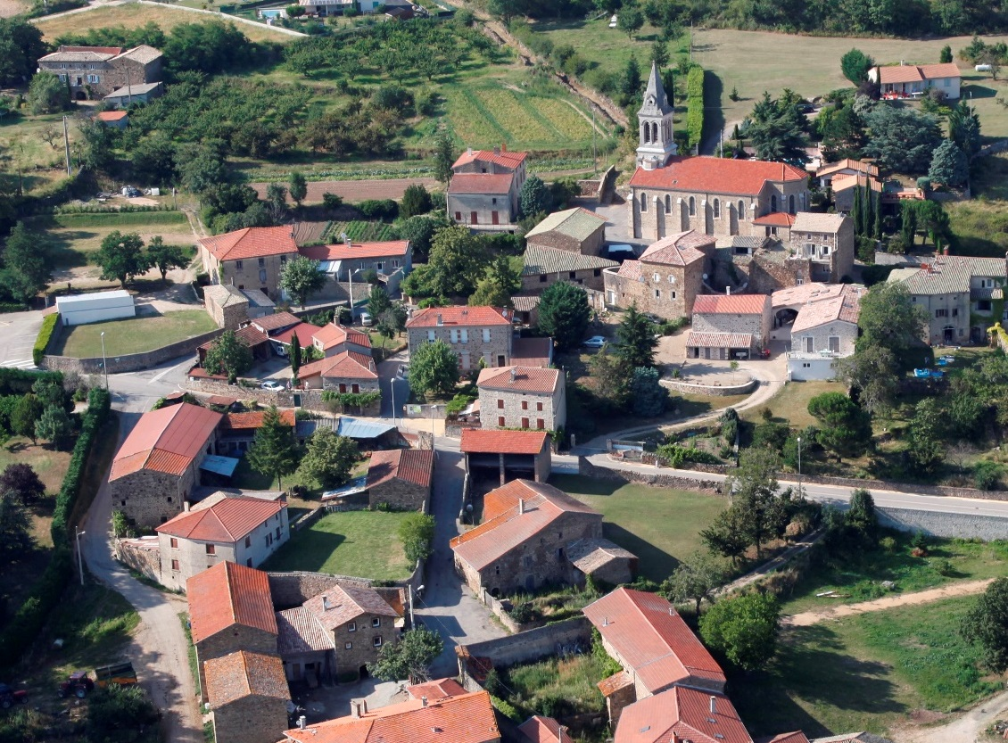 Vinzieux détail